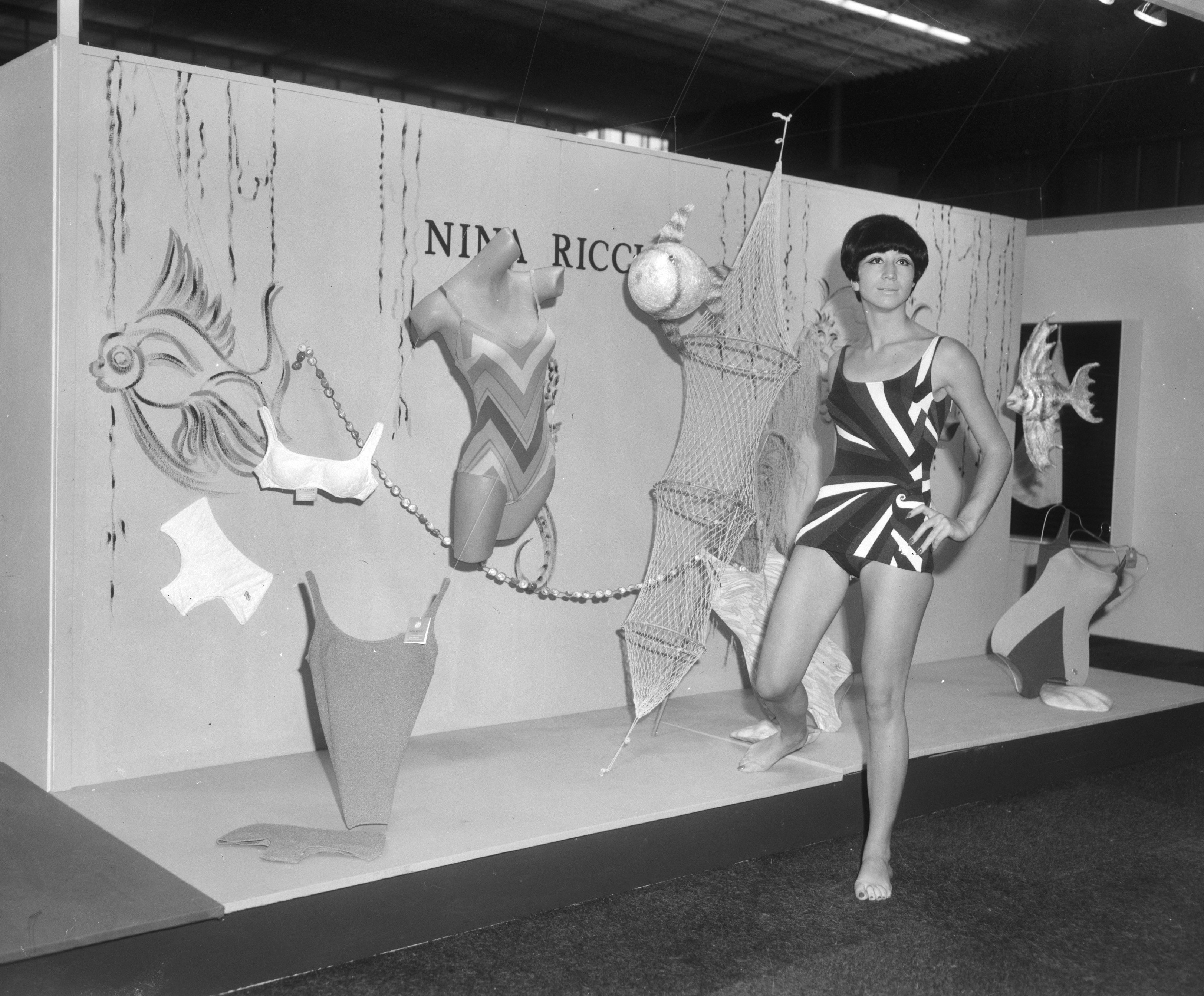 Collectie / Archief : Fotocollectie Anefo Reportage / Serie : Mode en confectiebeurs Intercontex in de RAI te Amsterdam Beschrijving : mode, badkleding, beurzen Datum : 10 oktober 1966 Locatie : Amsterdam, Noord-Holland Trefwoorden : badkleding, beurzen, mode Instellingsnaam : Ricci, Nina, Textilia Fotograaf : Bilsen, Joop van / Anefo Auteursrechthebbende : Nationaal Archief Materiaalsoort : Negatief (zwart/wit) Nummer archiefinventaris : bekijk toegang 2.24.01.04 Bestanddeelnummer : 919-6636